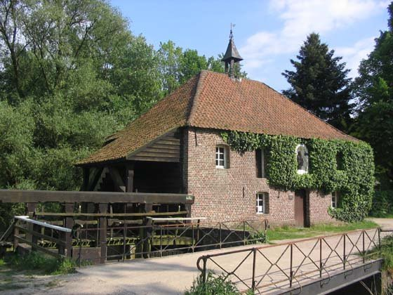 St-Ursulamolen, Nunhem (Leudal). Foto door gebruiker zelf gemaakt.